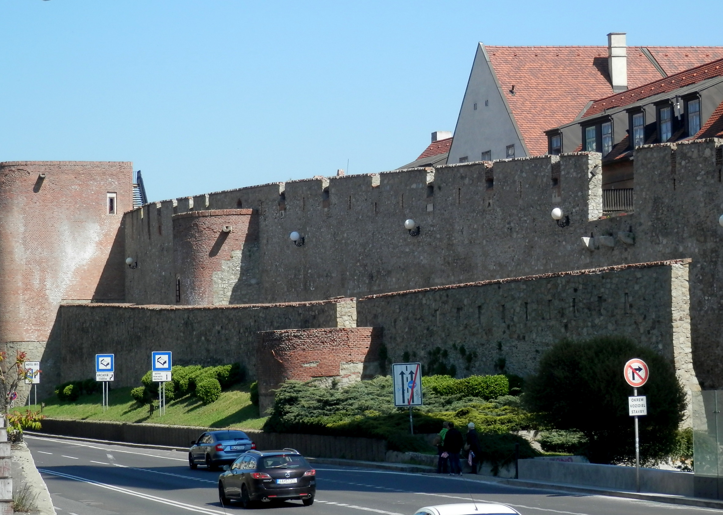 Historické mestské hradby. Bratislava.